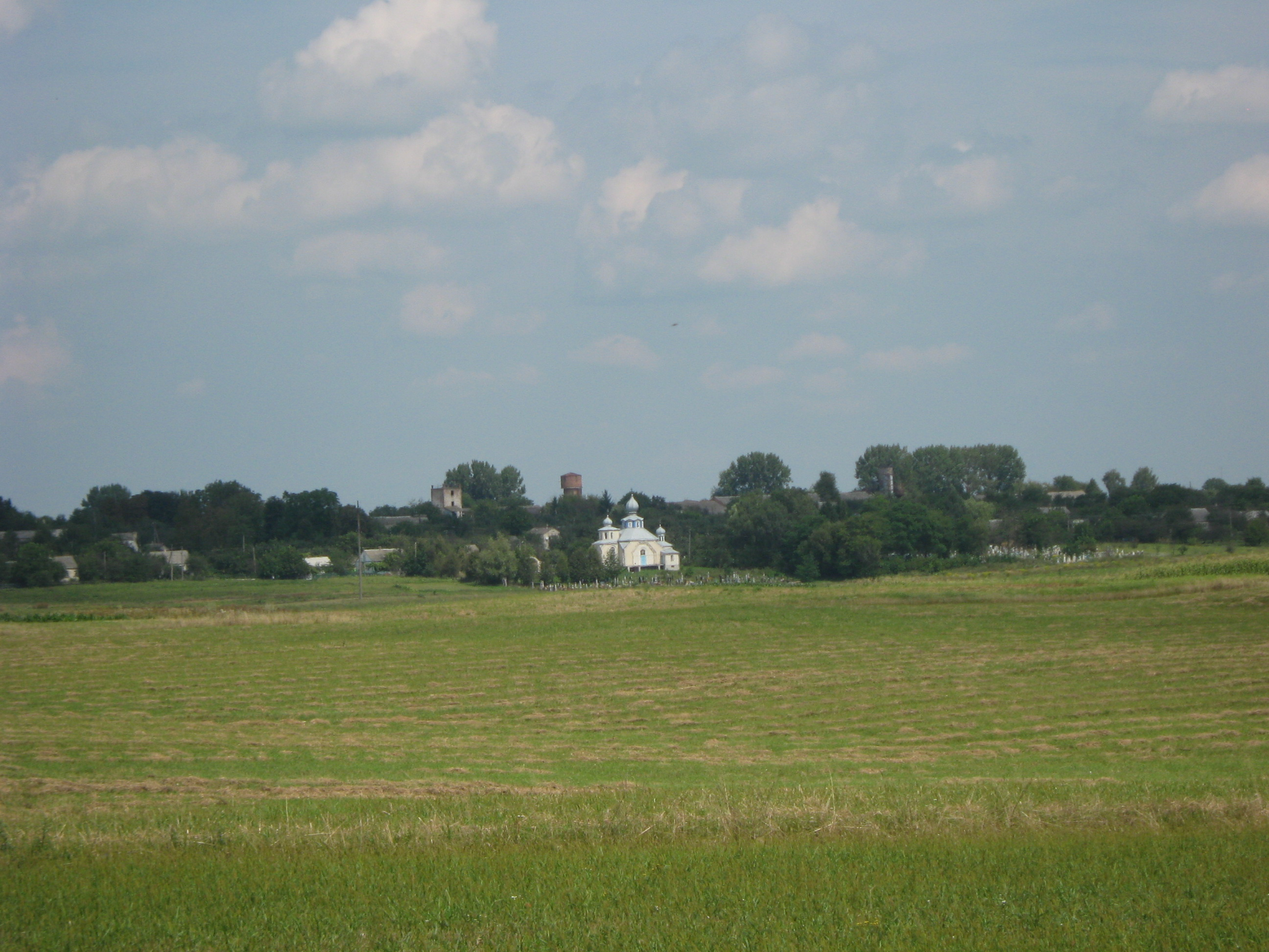 Панорама смт. Сенкевичівка